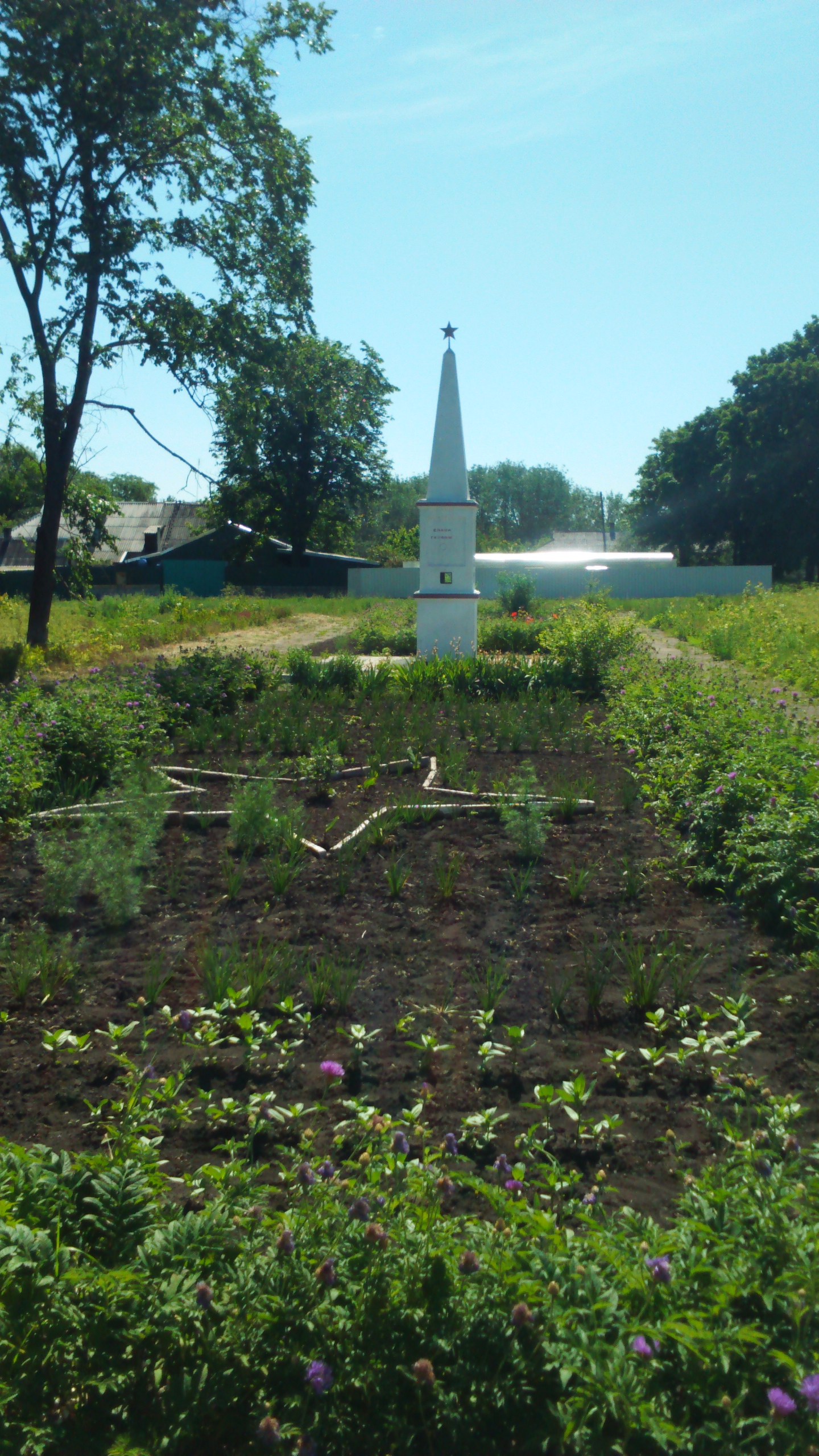 Світле — селище в Україні, Добропільському районі Донецької області, над річкою Водяна.